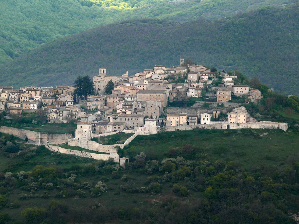 Monteleone di Spoleto, view